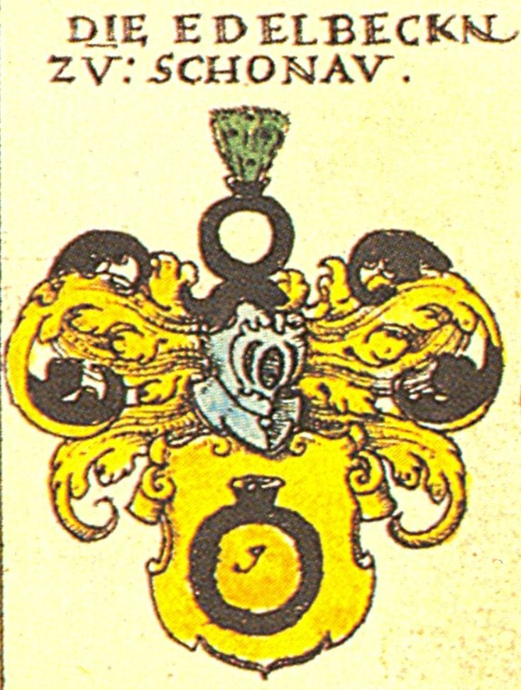 Wappen der Bayerischen Adelsfamilie Edelbecken von Schönau